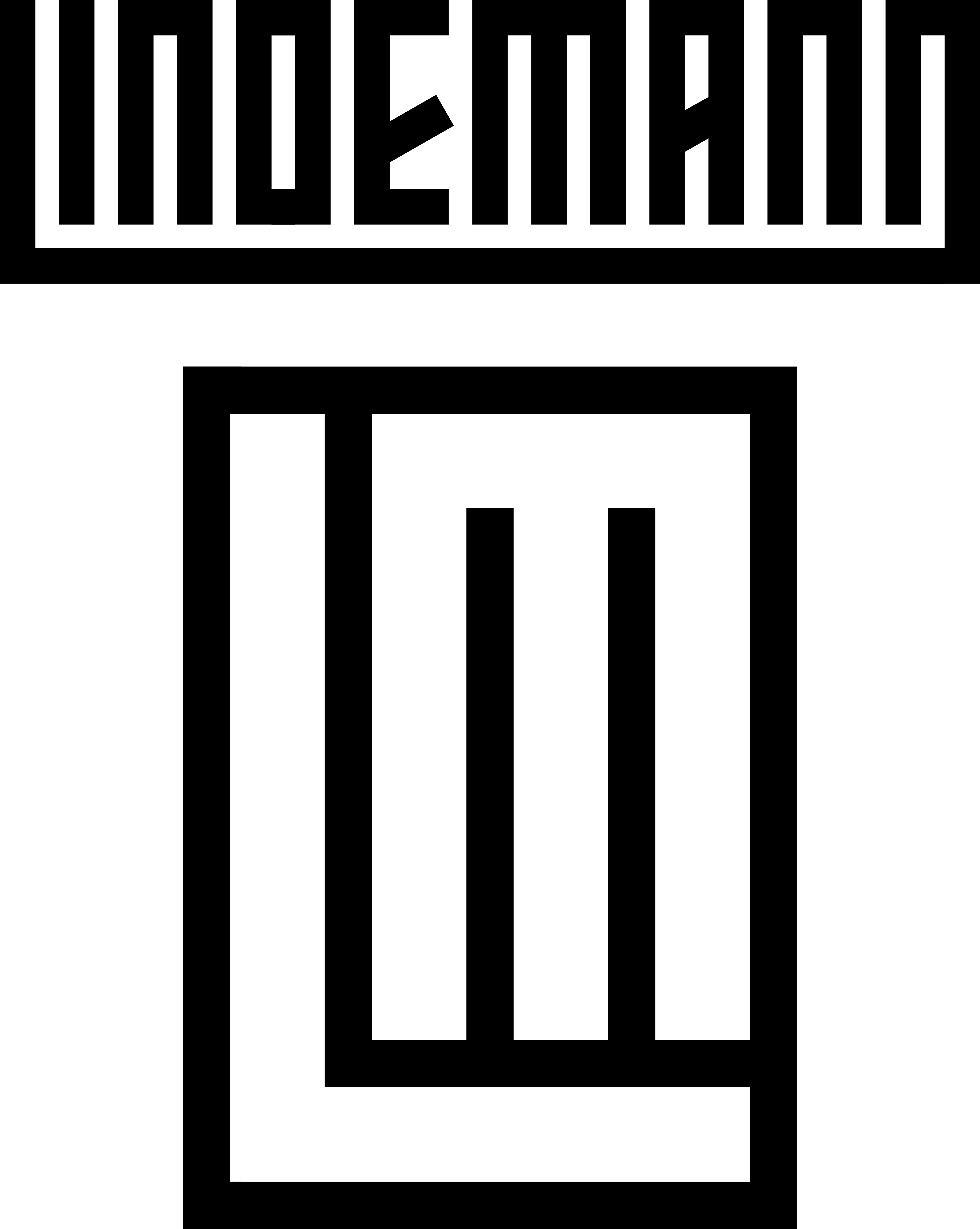 Logo von Lindemann